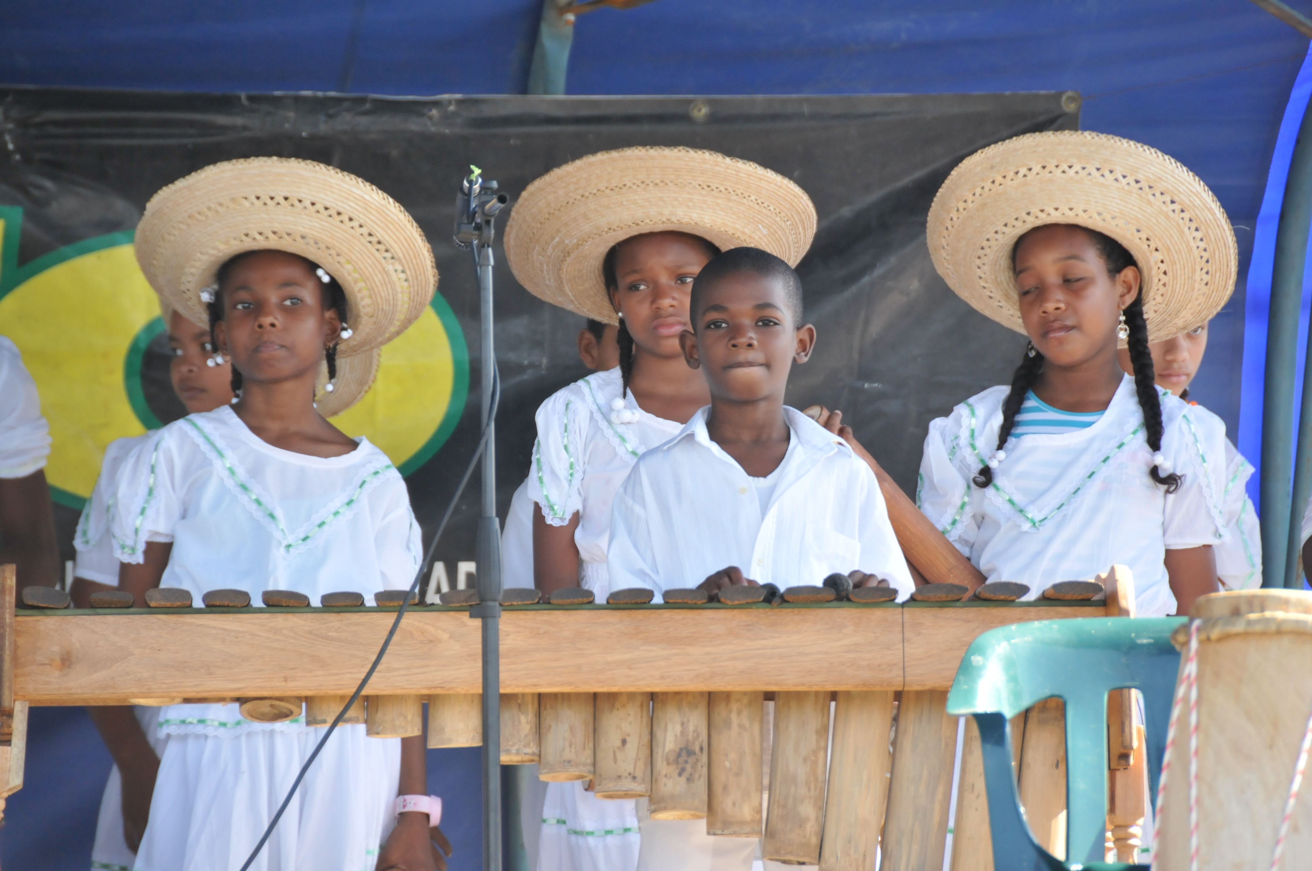 La Teletón ’Tumaco Unido y Solidario’ cuenta con la asistencia de diferentes autoridades del orden departamental y local, se lleva a cabo en el polideportivo San Judas. La actividad busca recolectar fondos para los comerciantes que perdieron sus negocios durante el atentado terrorista del pasado primero de febrero. Cientos de personas de diferentes regiones de Colombia han entregado sus aportes y se espera reunir 1.000 millones de pesos